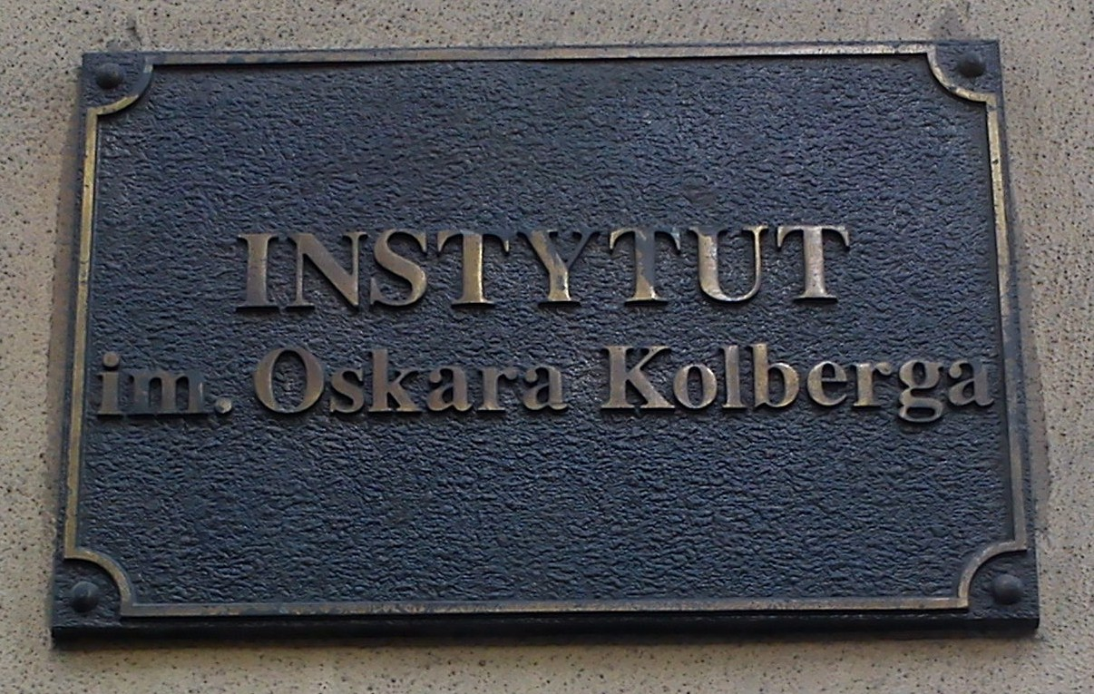 Instytut im. Oskara Kolberga, Poznań (ul. Kantaka 4).